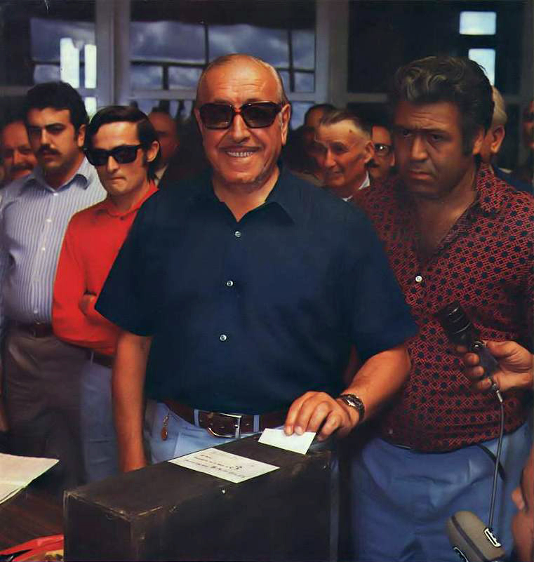 El candidato a Presidente de la Argentina, Héctor Cámpora, votando en las elecciones que ganaría.